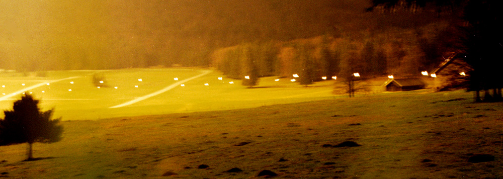 Lichter der Steuerraketen (Les Rochats, Schweiz)Blickrichtung Süden